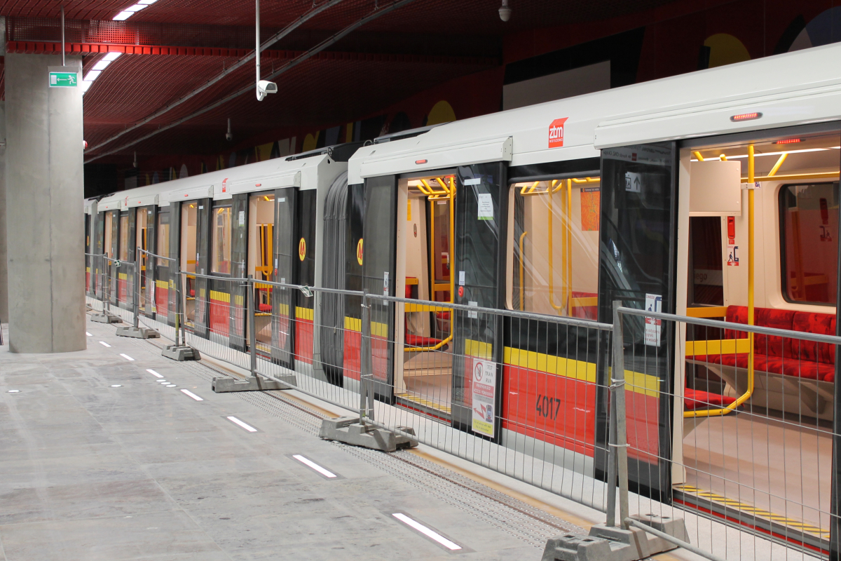 Siemens Inspiro (pociąg numer 57) stoi na stacji C9 Rondo Daszyńskiego.